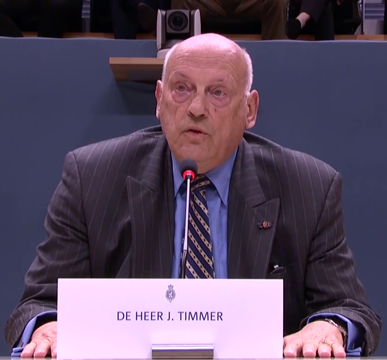 Openbaar verhoor van Jan Timmer, president-commissaris van NS van 1996 tot en met 2001, door de parlementaire emquêtecommissie Fyra op woensdag 20 mei 2015.